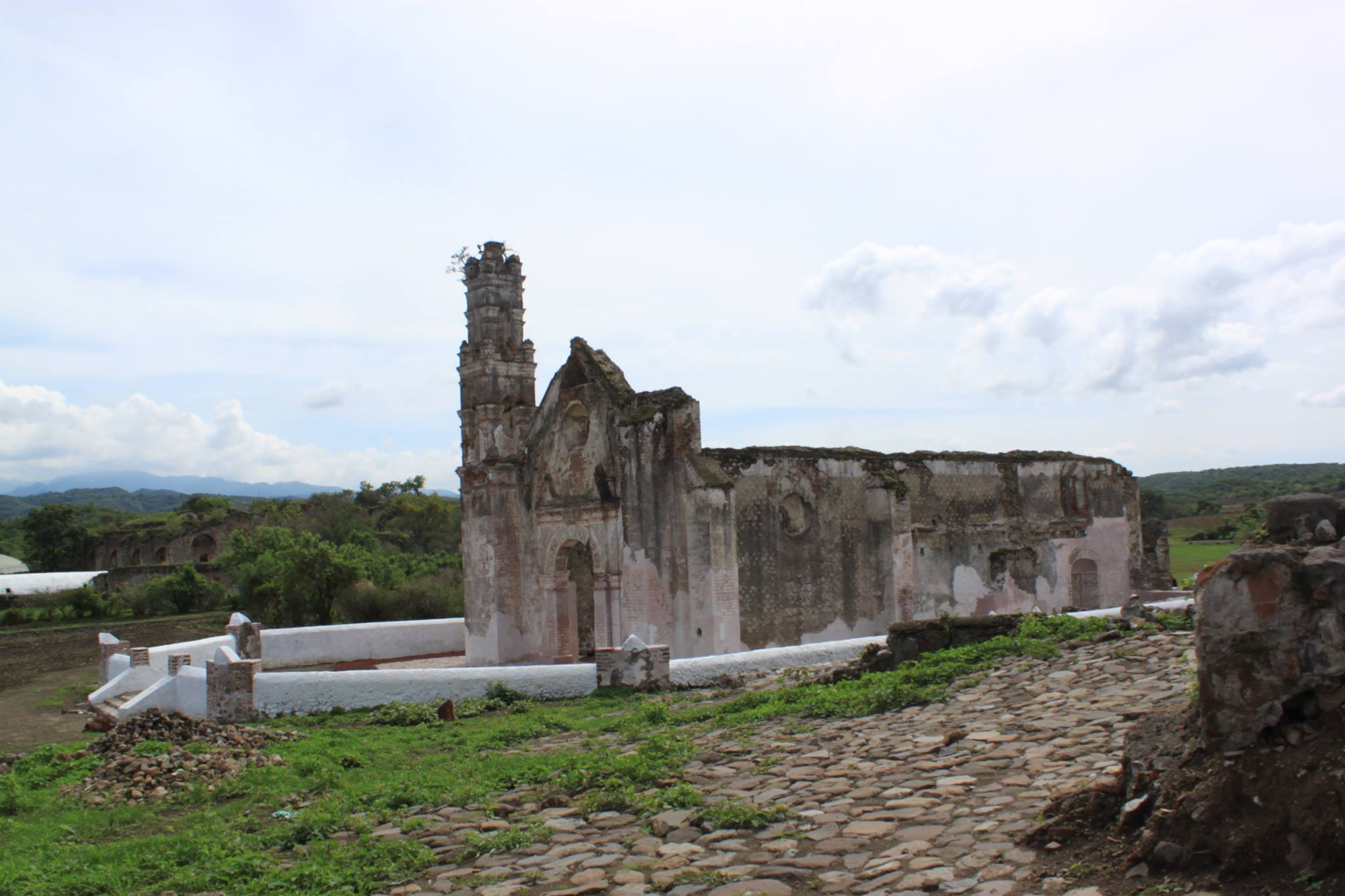 Iglesia de la ex-hacienda Chicomocelo en Tlacotepec, Morelos, México.